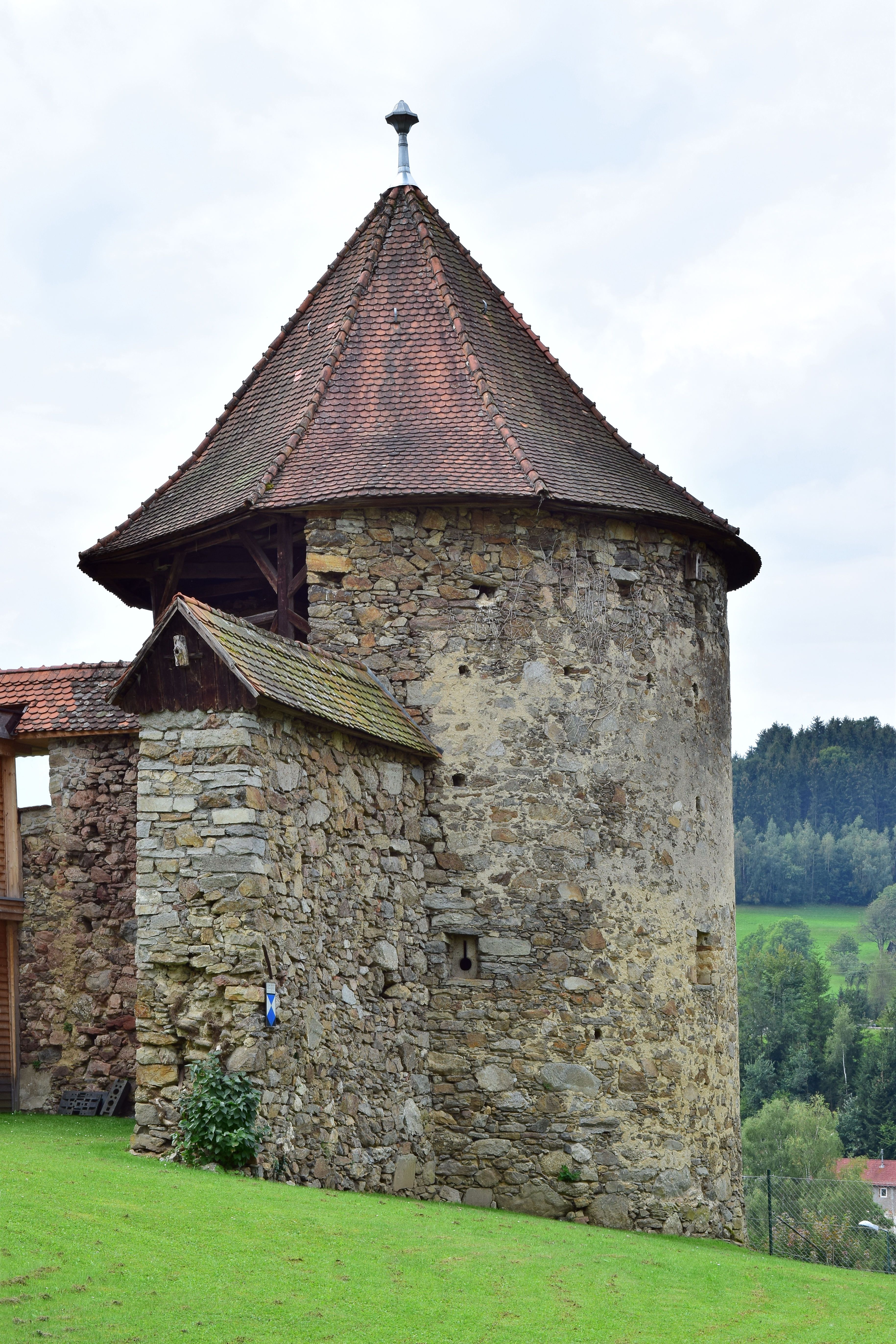 Teil der Marktbefestigung bei Windgasse 17 in Haslach an der Mühl